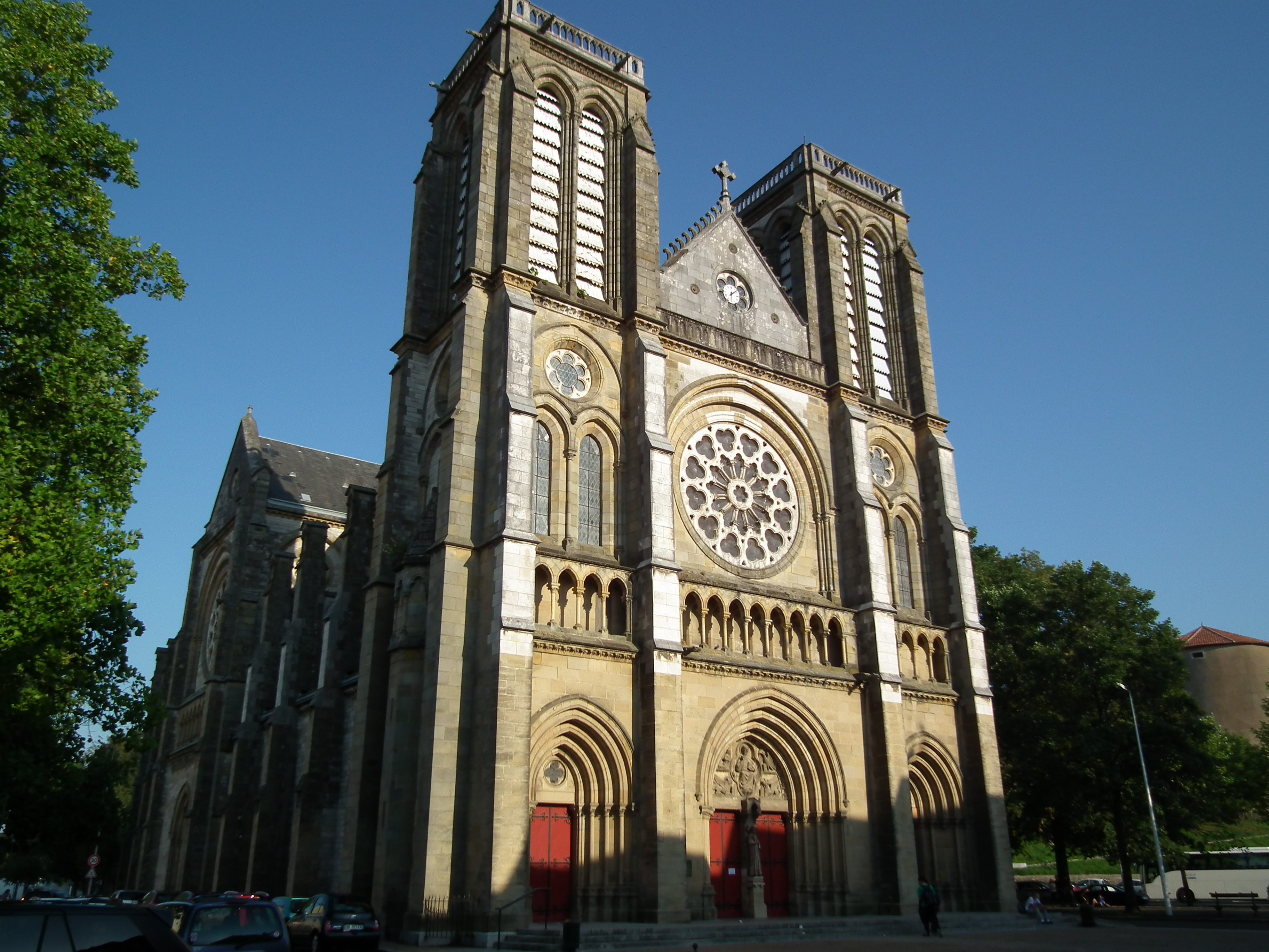 Eglise Saint-André de Bayonne